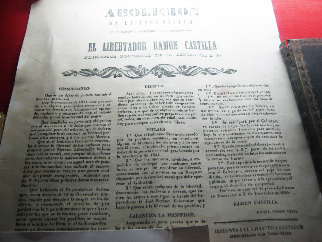 El Diario Abolicion entrevisó con ramón castilla